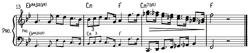 Cifrados